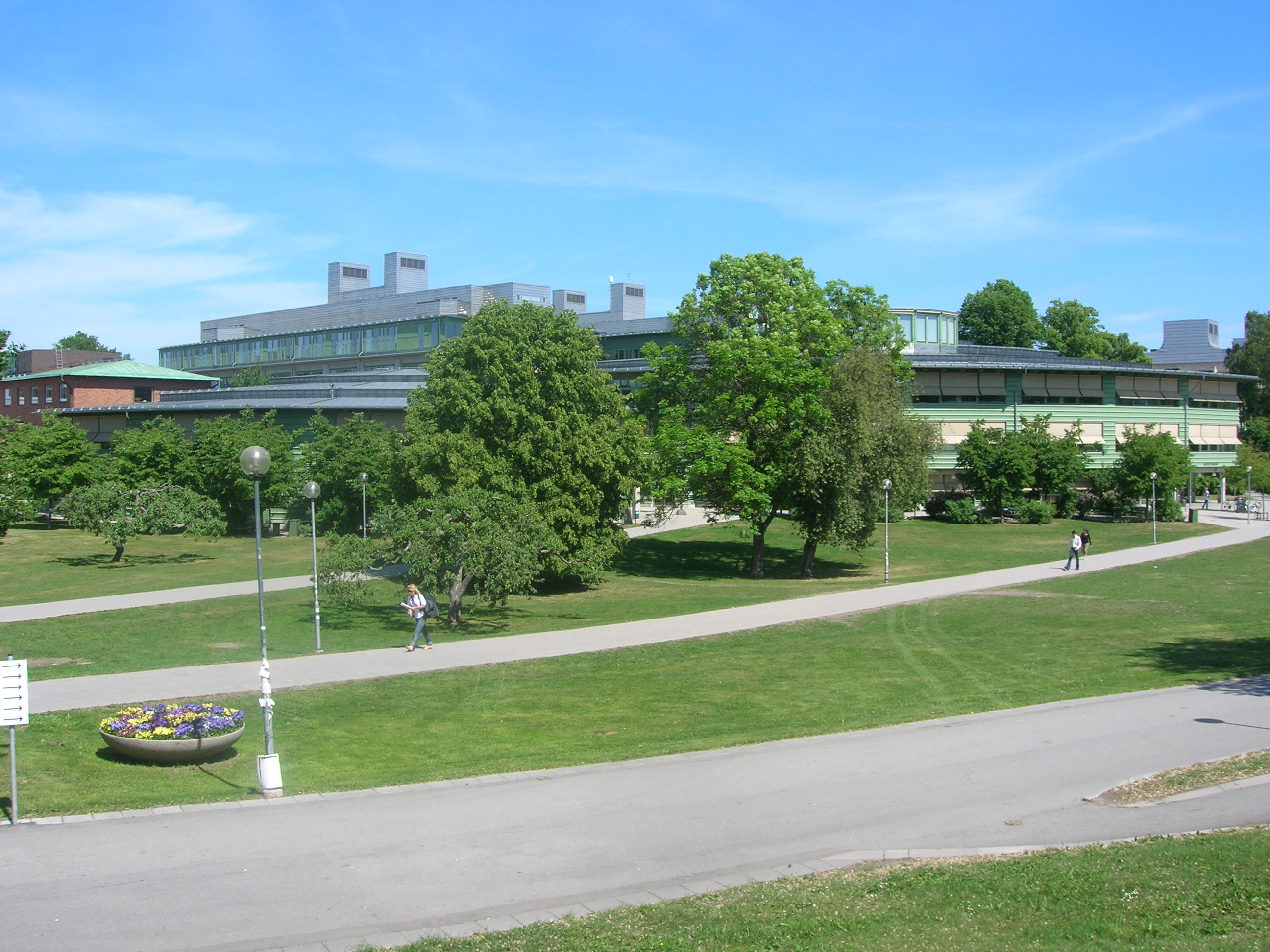 Geovetenskapens hus, Stockholms universitet, Stockholm, Sweden.